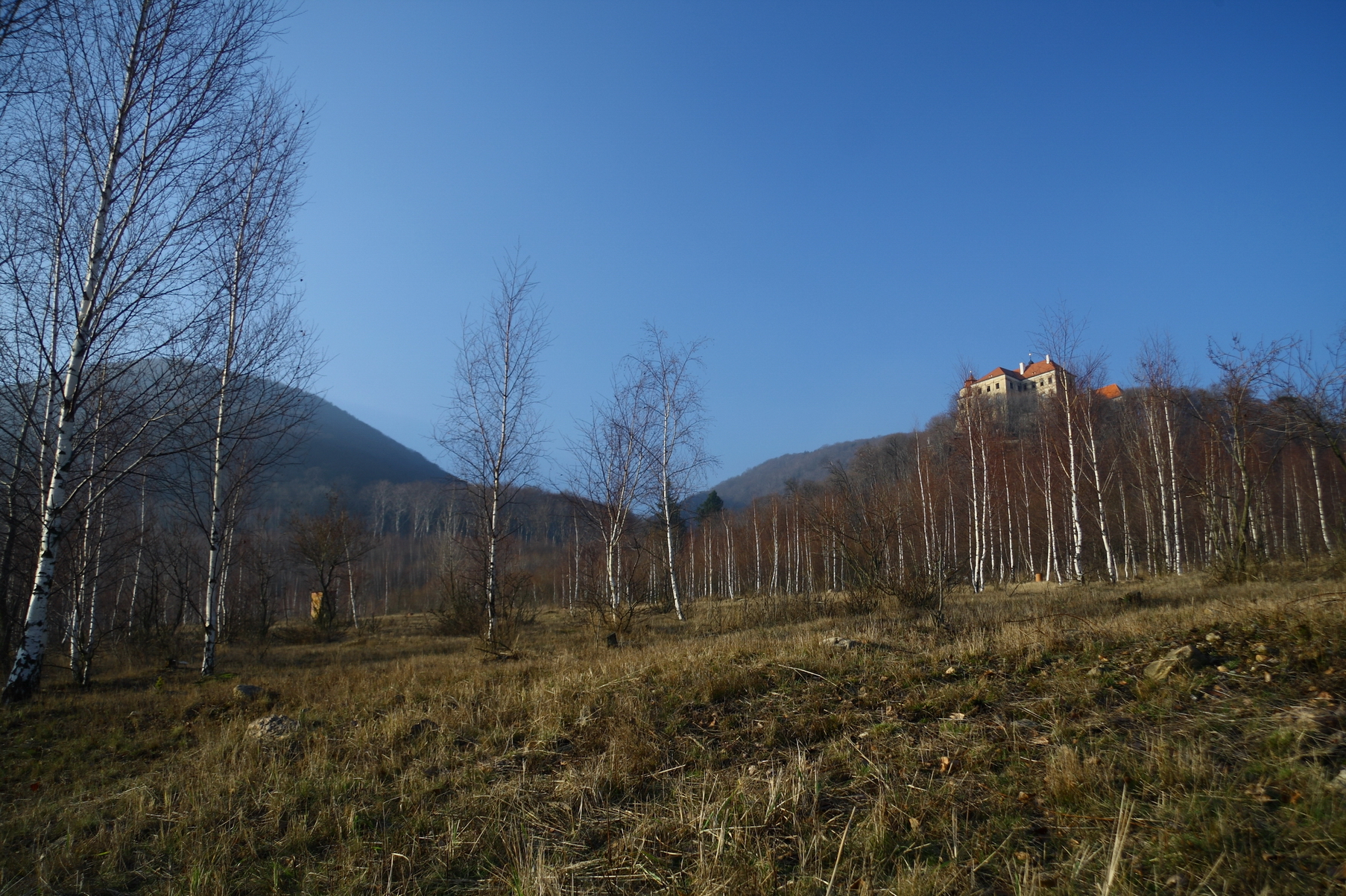 Jezeří Castle